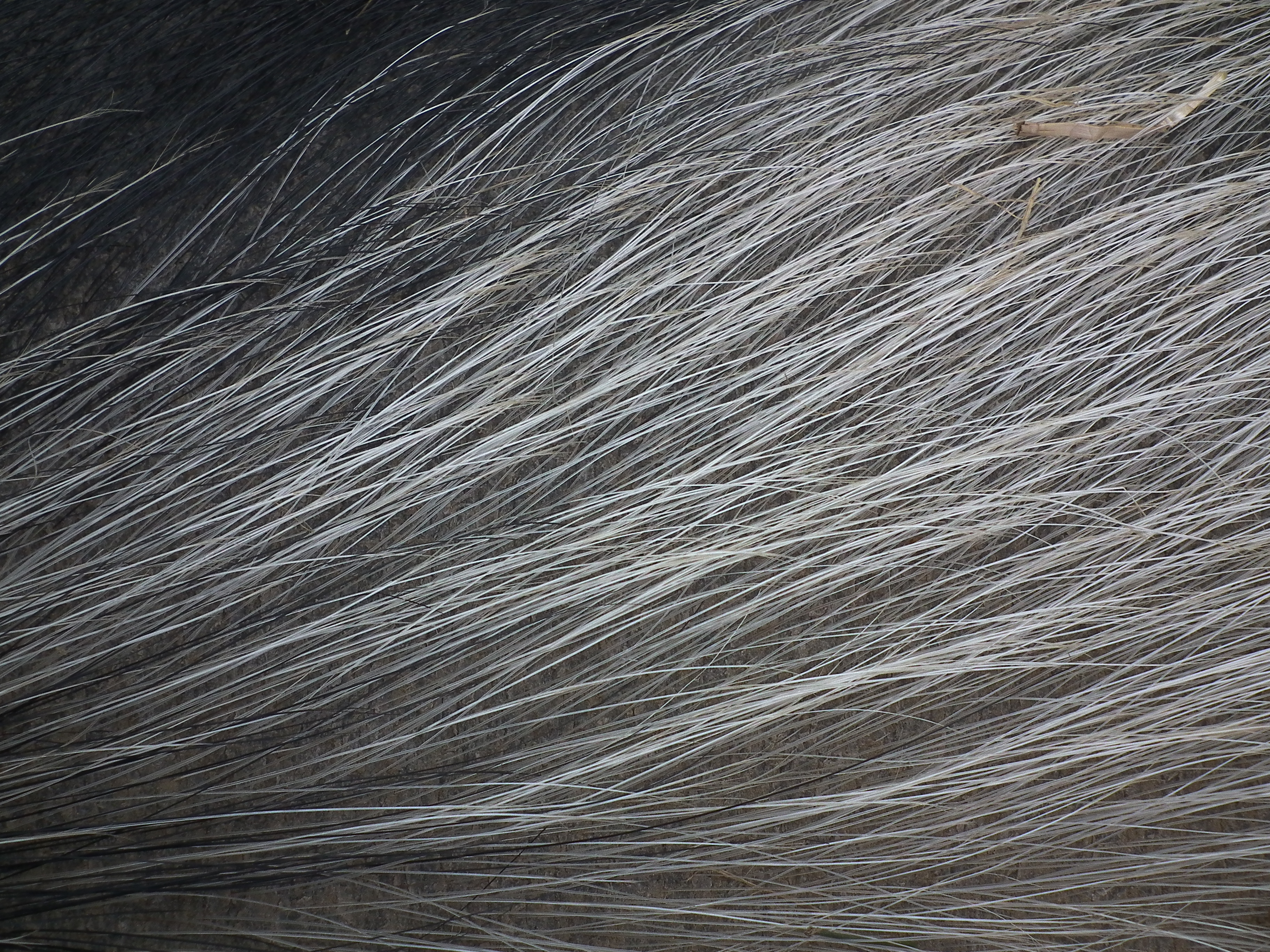 Buntes Bentheimer Schwein oder Bentheimer Landschwein im Tierpark Bretten (Baden-Württemberg, Deutschland)